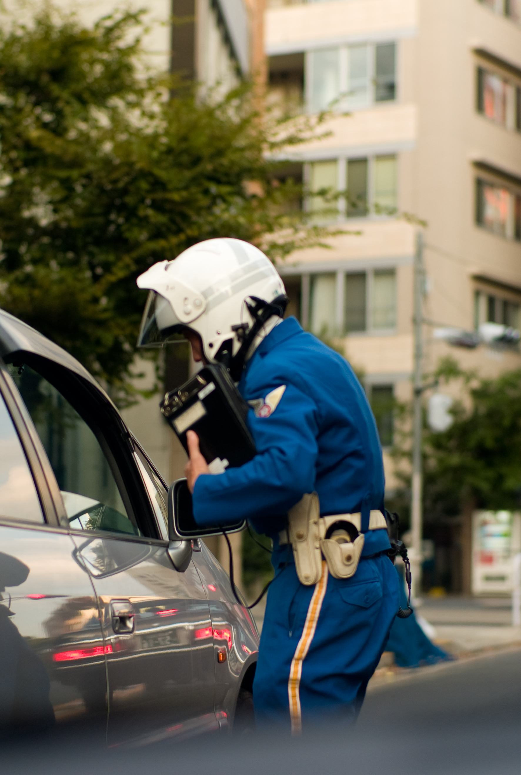 Japanese motorcycle policeman questioning driver.